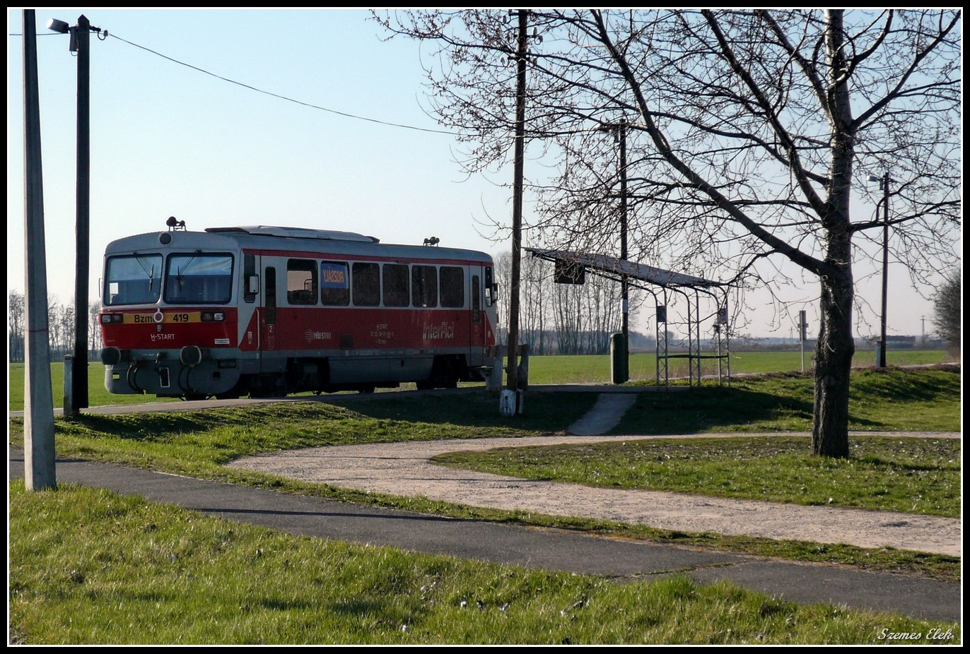 Rozsály, Hungary